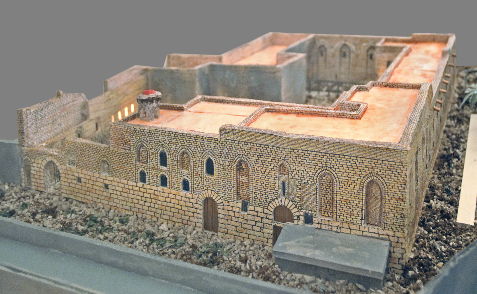 Maquette du palais de la Favara Au premier plan, le mur sud-ouest Le palais de la Favara (château Maredolce) était une des résidences, situées en dehors de la Palerme médiévale, dans le parc royal appelé Génoarde, construites par les souverains normands de Sicile et destinées à leurs loisirs. Le premier palais construit à cet emplacement date de l'époque arabe, il appartenait à l'Emir Giafar. Il a été transformé par le roi normand Roger II vers 1153, il était situé à l'ouest de la Palerme médiévale, au bord d'un lac, alimenté par des sources proches (al-Fawwara : source en arabe). Il était entouré de vergers. Actuellement, il est dans le quartier pauvre de Brancaccio et se trouve entouré d'habitations populaires peu esthétiques. Les expropriations ont commencé en 1990 au sein du palais pour pouvoir être remis en valeur. Actuellement les murs extérieurs et certaines salles intérieures ont été restaurées. L'édifice lui-même est encore en partie habité mais les commerces qui y étaient installés ont déménagé. Le lac associé au palais avait disparu car les sources ont été captées en amont pour d'autres usages mais il devrait être progressivement rétabli comme les vergers voisins dont certains viennent d'être rachetés par la région Sicile et par le ministère italien des biens culturels pour reconstituer le parc. L'édifice ne se visite que sur rendez-vous. Ce projet de mise en valeur culturelle devrait contribuer à transformer dans quelques années ce quartier de Palerme peu attractif. Article de Wikipedia sur le palais de la Favara Le palais sur le site de Palerme